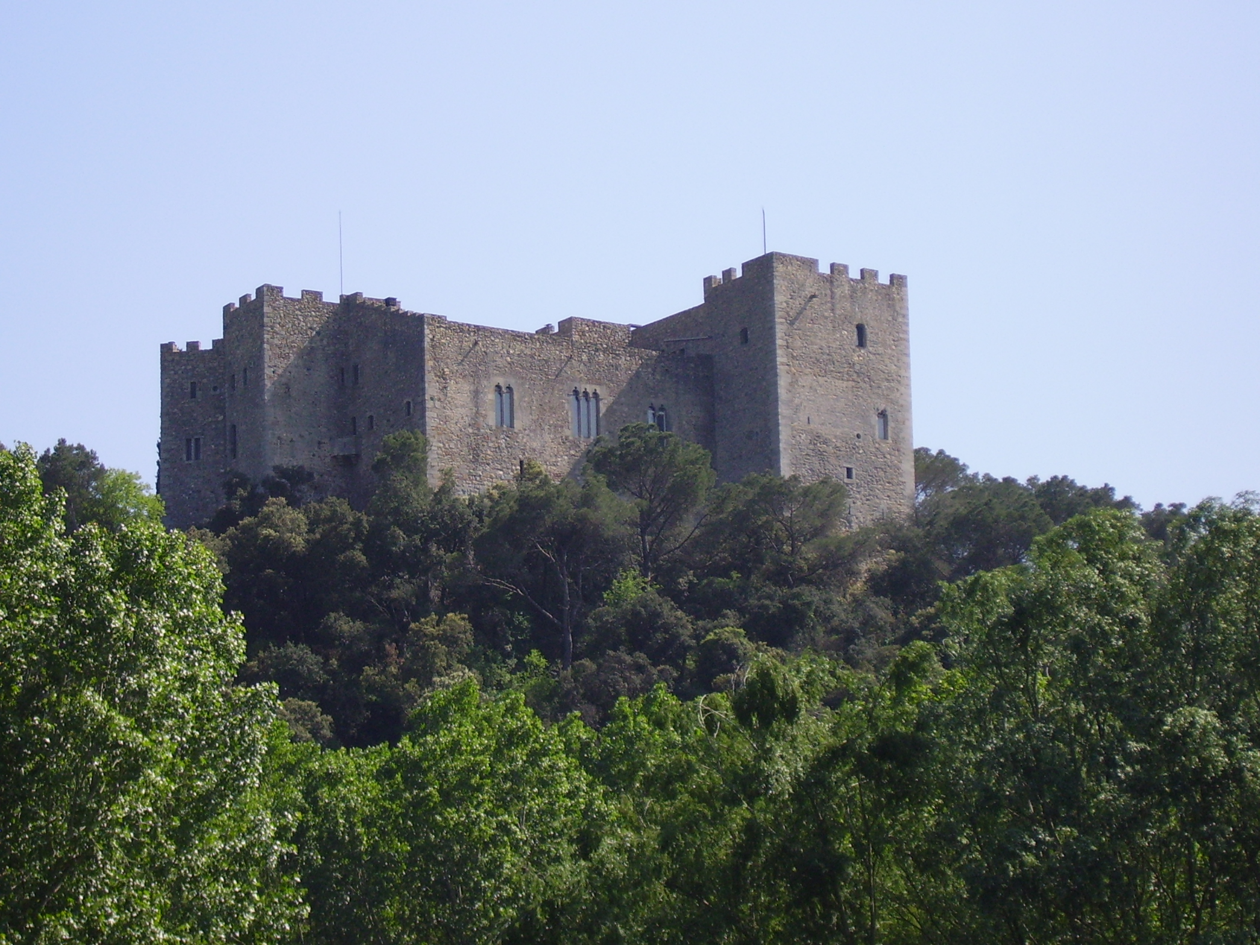 Castell de la Roca (La Roca del Vallès), Vallès Oriental, Catalunya